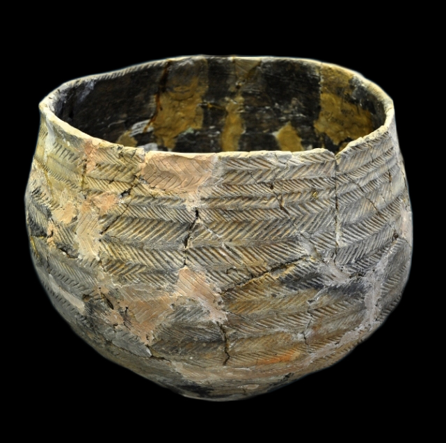 Пасудзіна гліняная. Неаліт. Рог. Паселішча Асавец-ІІ Бешанковіцкага раёна Віцебскай вобласці. Раскопкі М.М. Чарняўскага.